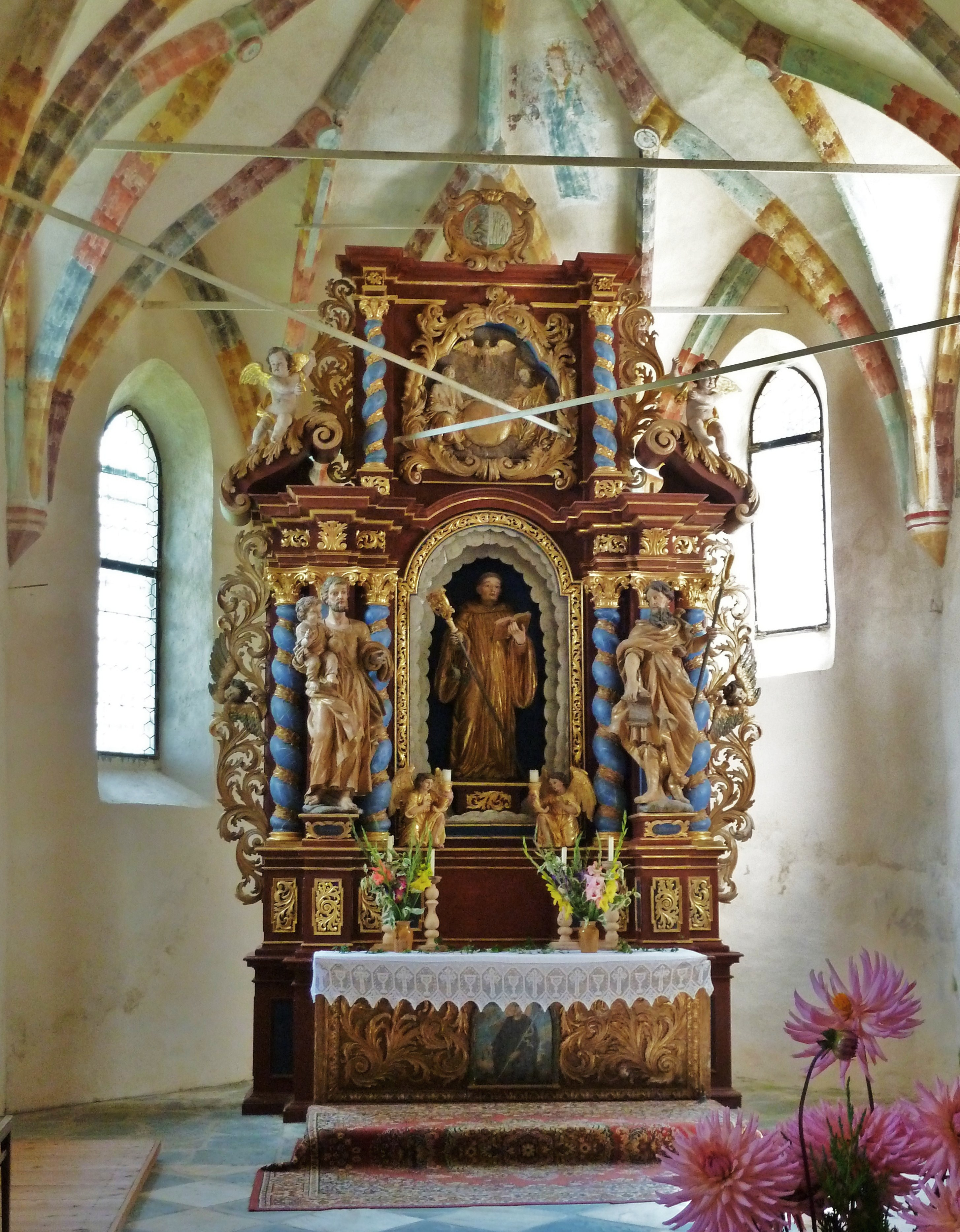 Hochaltar